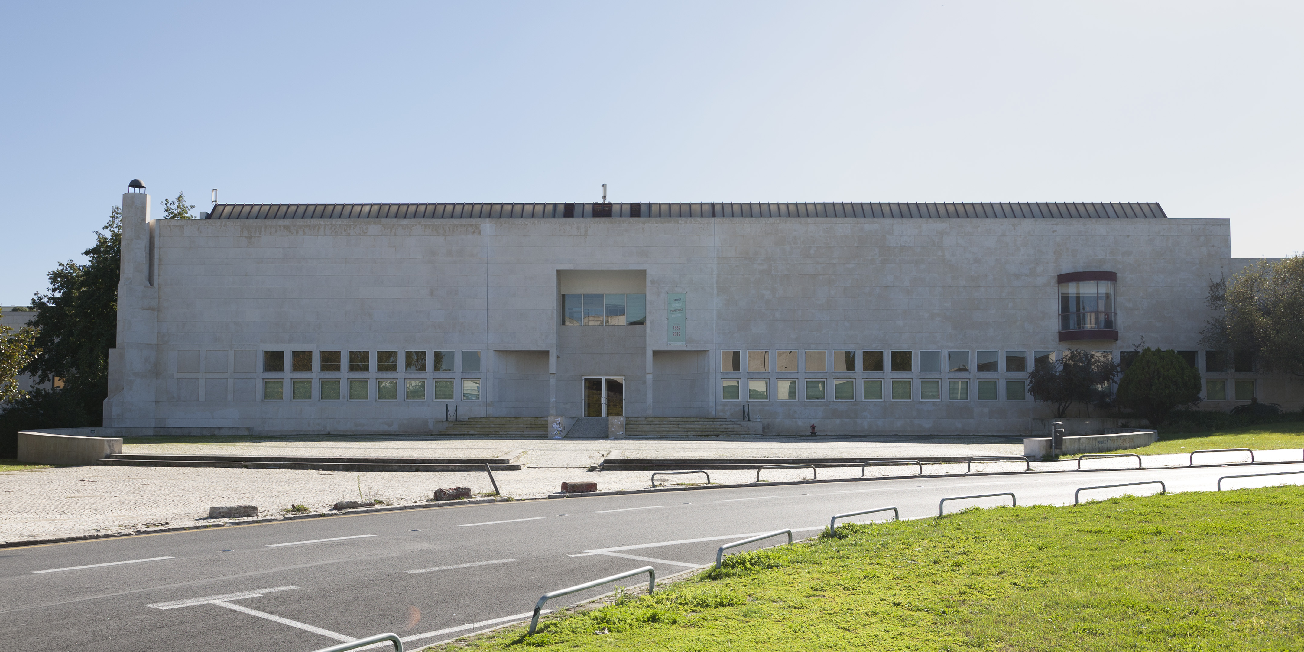 Faculdade de Psicologia, Cidade Universitária, Lisboa, Arq. Manuel Tainha